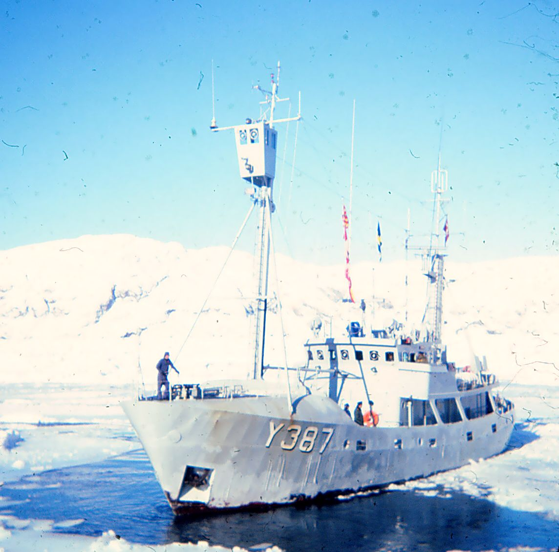 Y387 Inspektionskutteren Agpa i isen i Arsuk-fjorden på Grønland. Maj 1977.